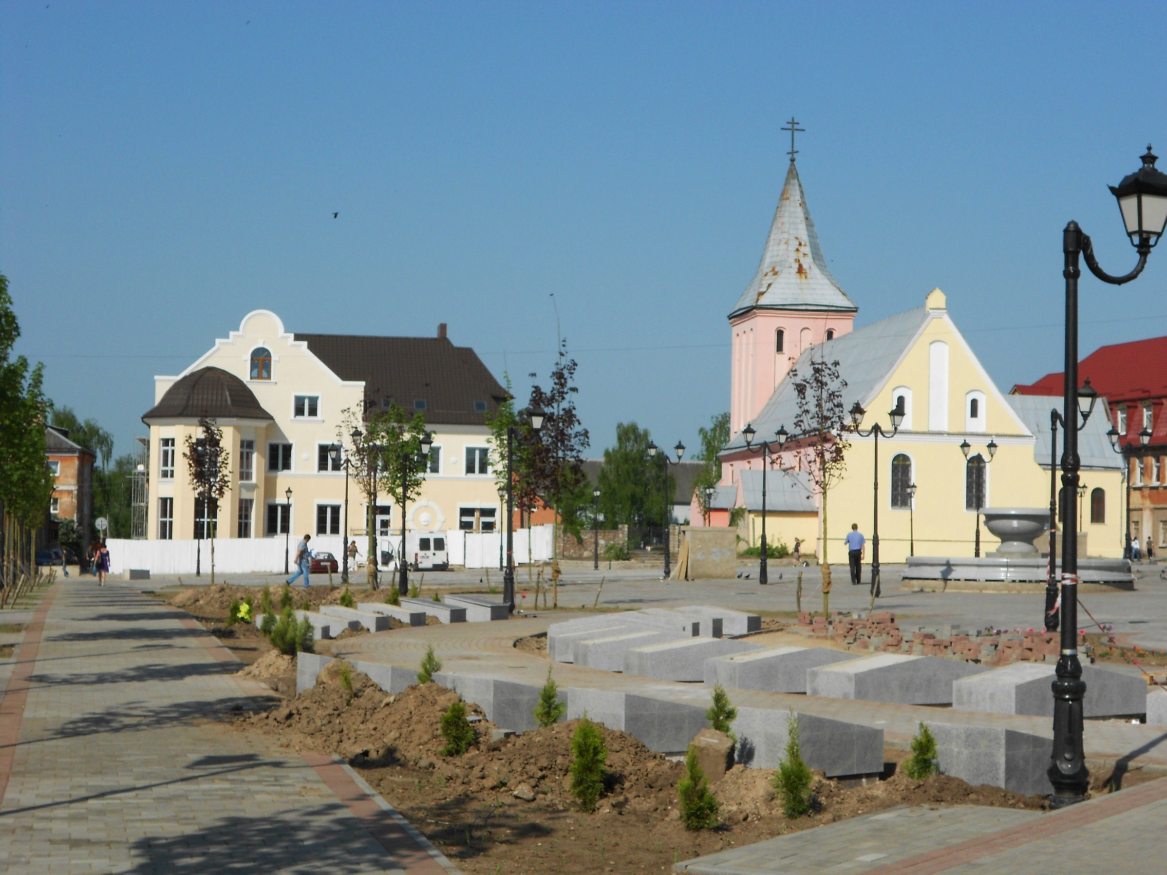 Topiau aka Gvardeysk